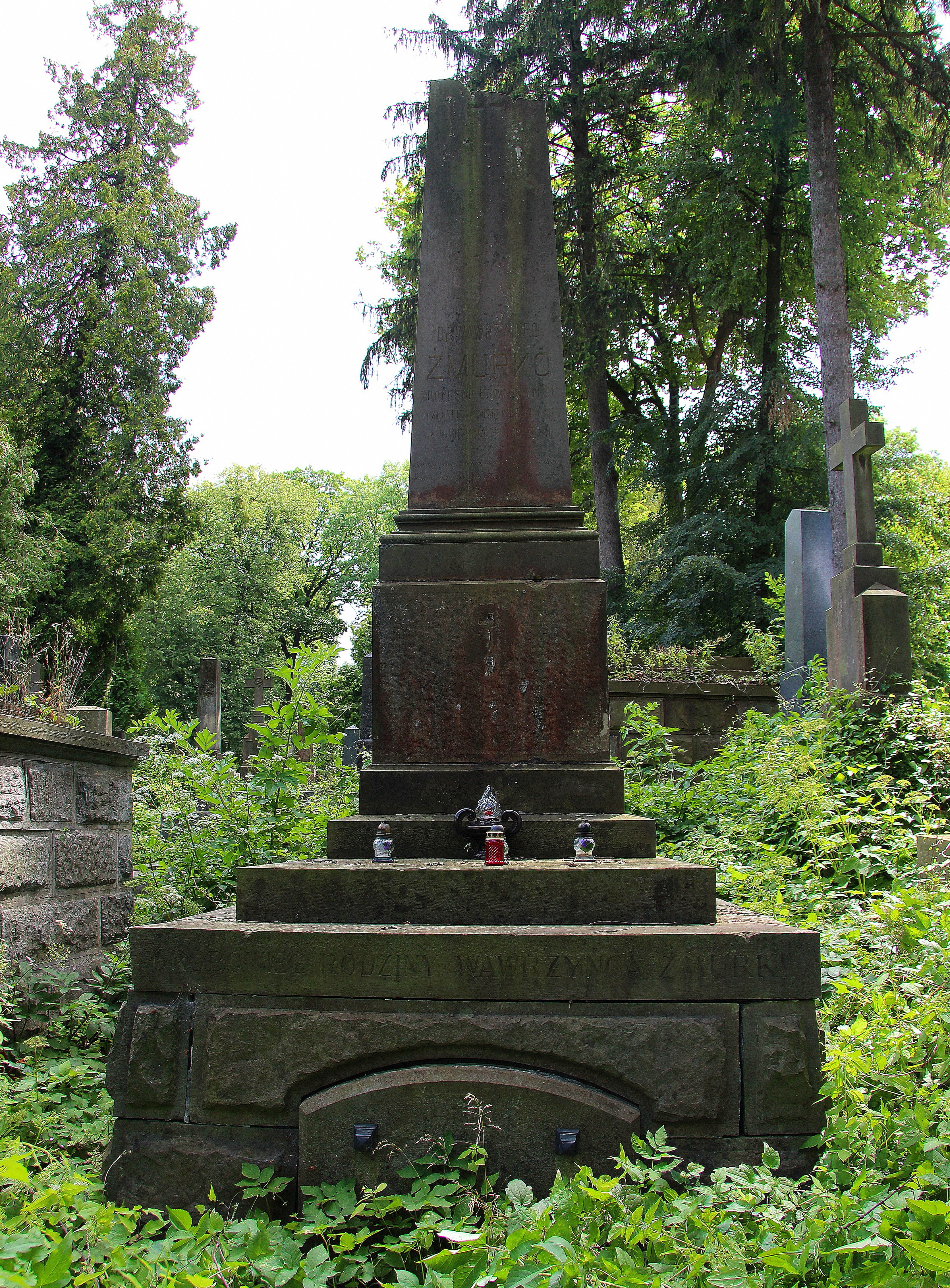 Гробниця родини Жмурків (Żmurko). Личаківський цвинтар ,поле № 69.